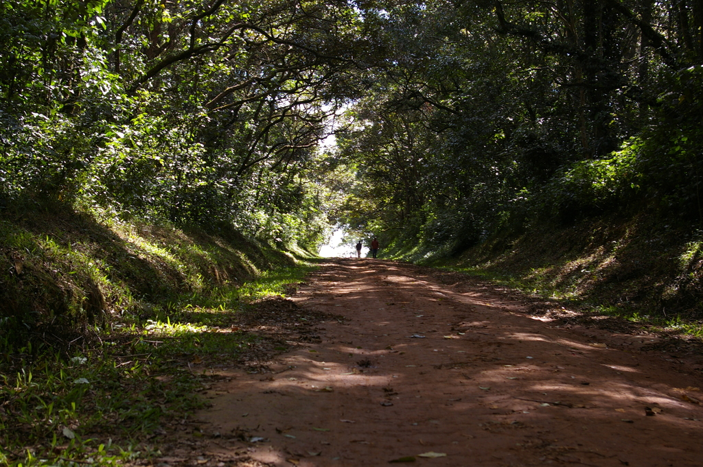 Kenya